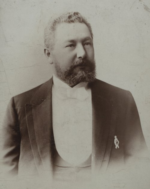 Julisz Kunitzer (1843-1905), łódzki przemysłowiec.